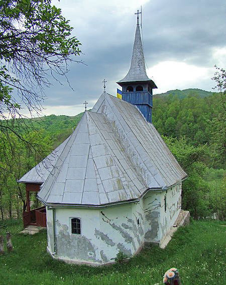 Biserica de lemn din Runc